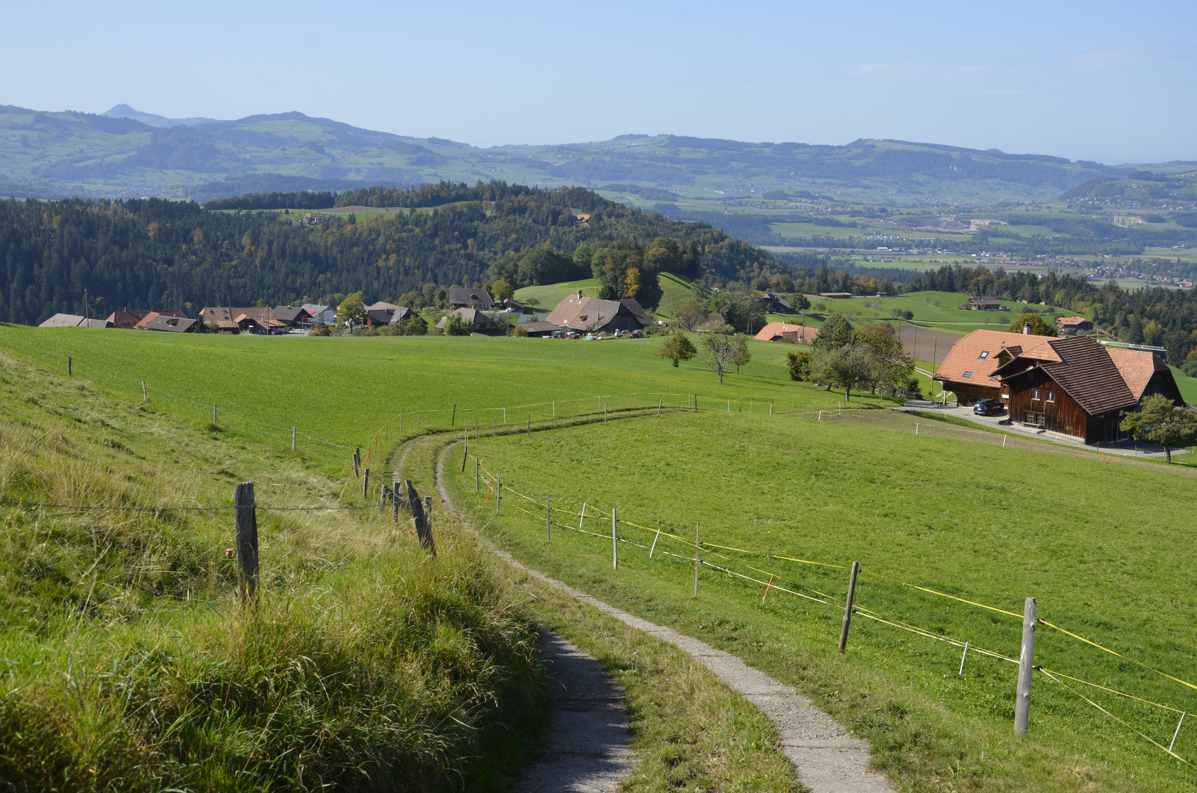 Kanton Bern (Schweiz): Lueg, Gemeinde Fahrni